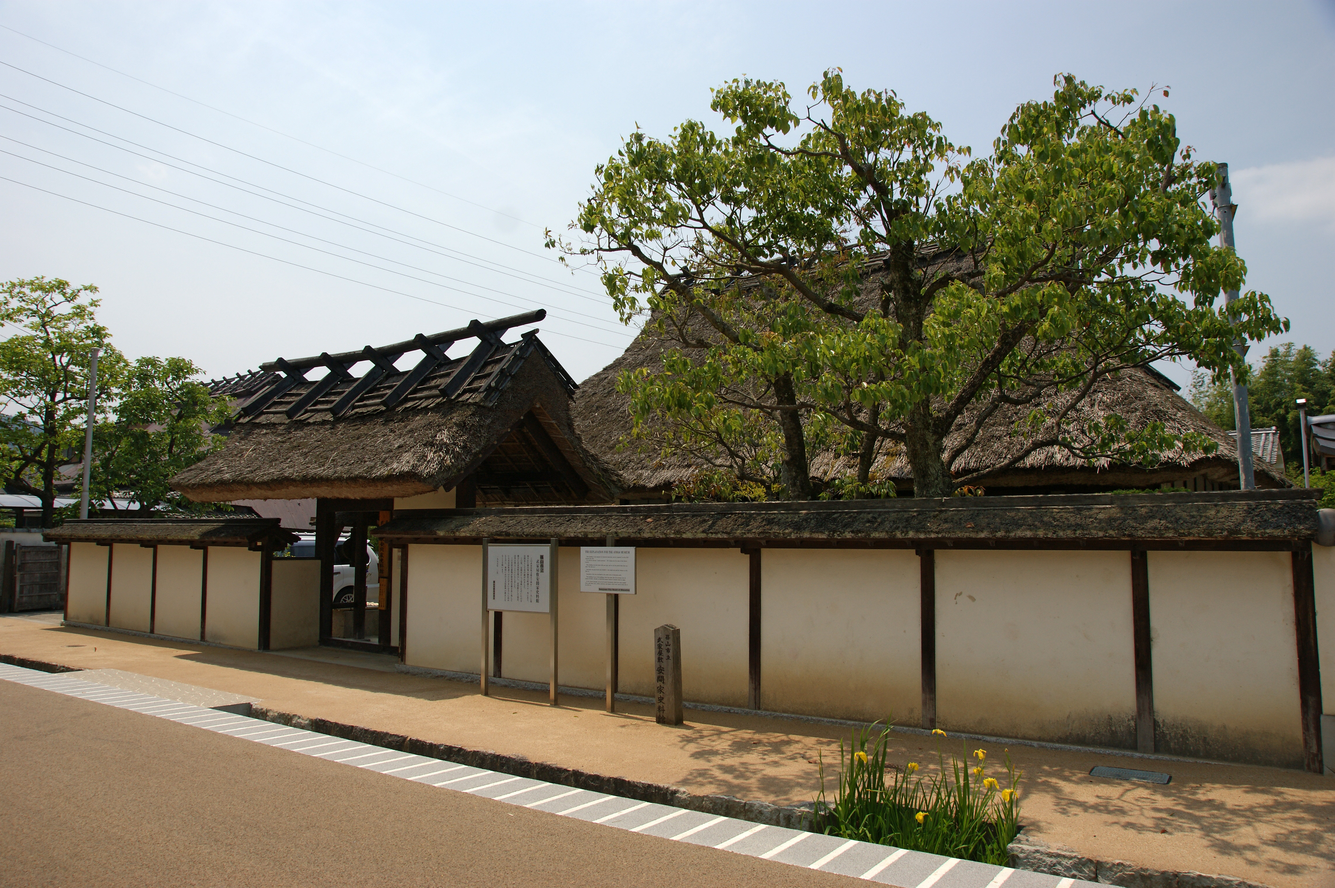 Okachi-machi in Sasayama, Hyogo prefecture, Japan